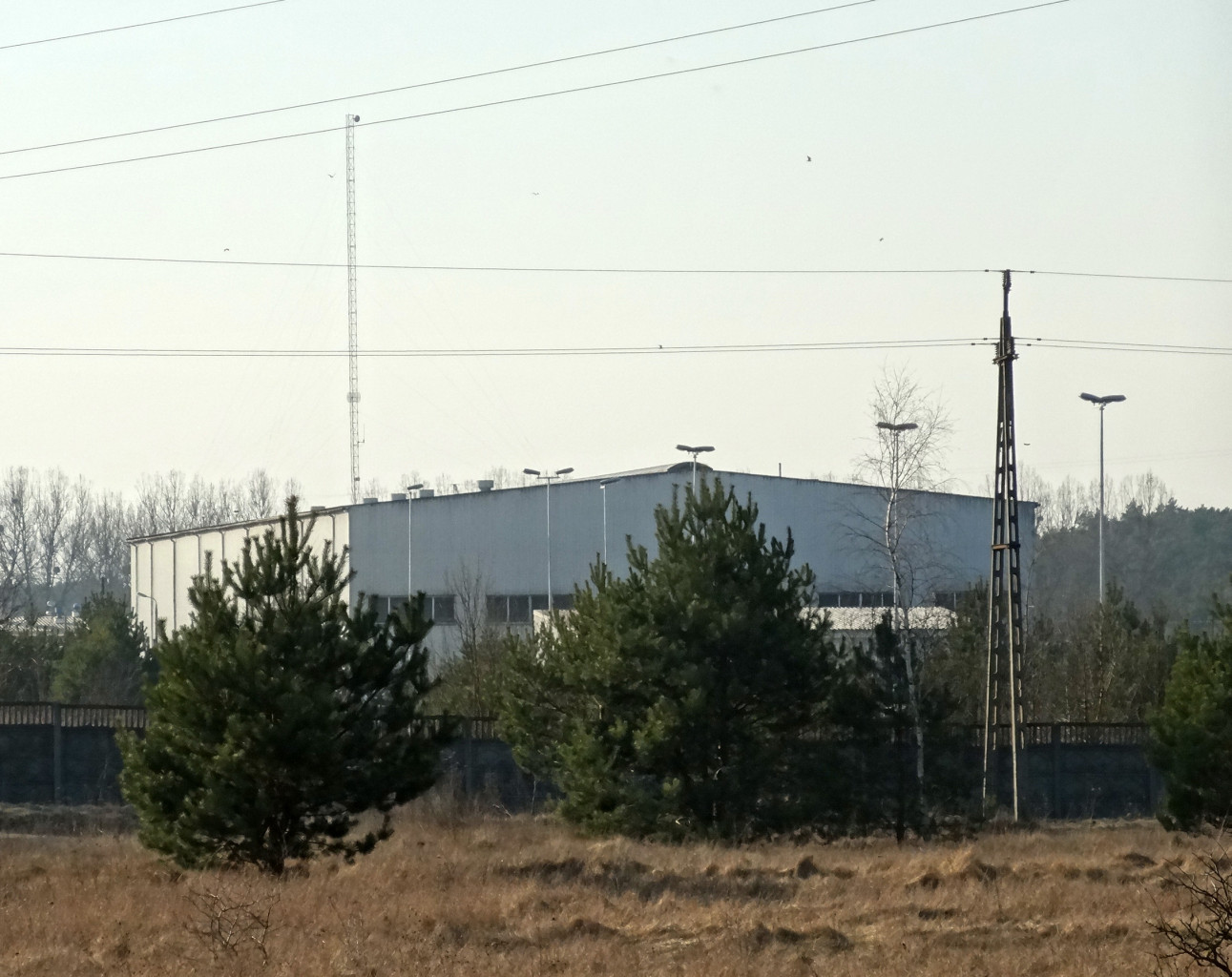 Kompleks Utylizacji Odpadów Komunalnych w Wypaleniskach k. Bydgoszczy